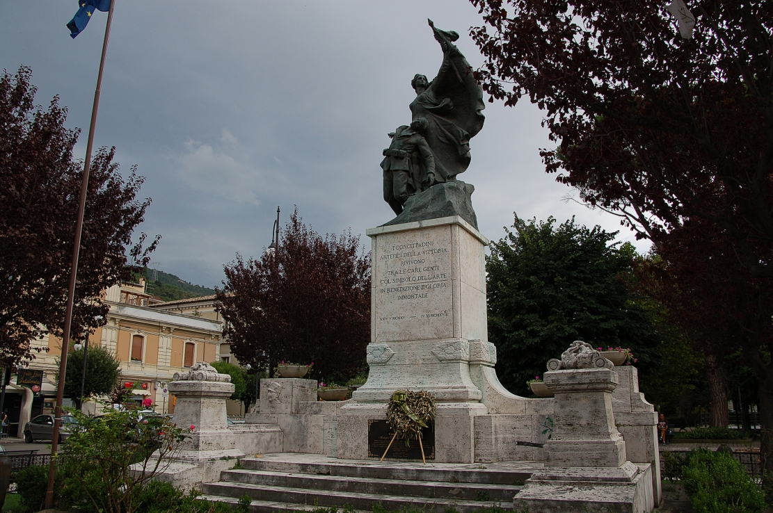 Popoli